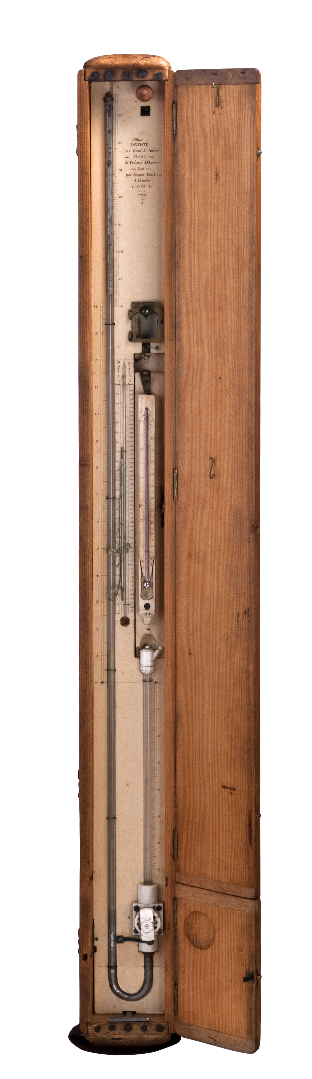 Prototype de baromètre transportable